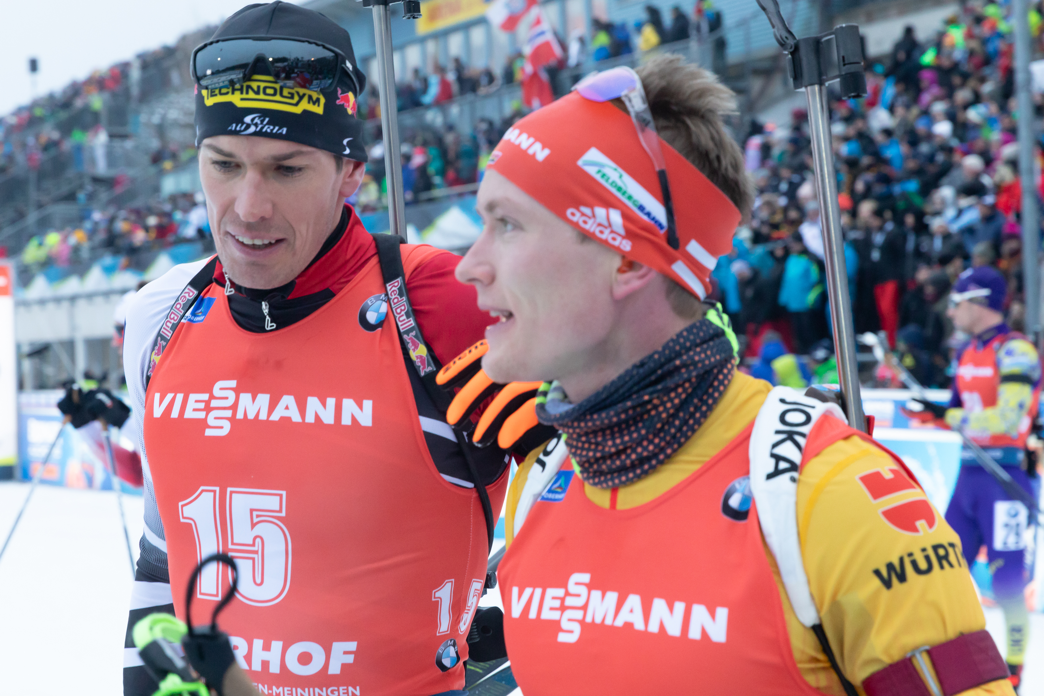 IBU World Cup Biathlon Oberhof; v.li.: Julian Eberhard (AUT, Österreich) im Gespräch mit Benedikt Doll (GER, Deutschland)